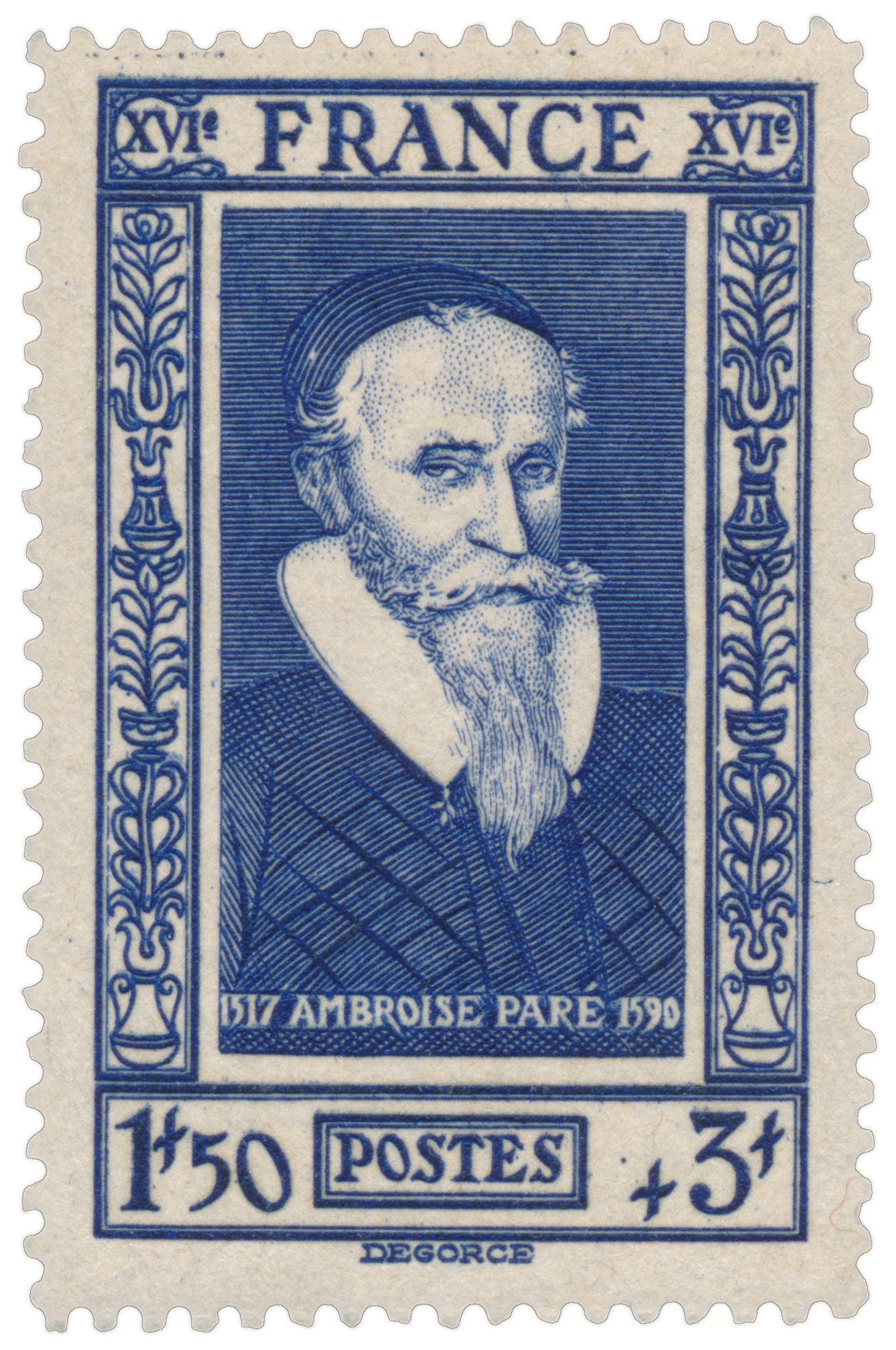 Tmbre Ambroise, émis en 1943